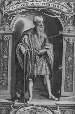 Meinhard II. (* um 1238; † 1. November 1295 in Greifenburg) aus dem Geschlecht der Meinhardiner war Graf (als Meinhard II.) von Görz und Tirol und Herzog von Kärnten (1286-1295). Er war einer der bedeutendsten Fürsten des 13. Jahrhunderts und der Begründer Tirols als eigenständiges Land.